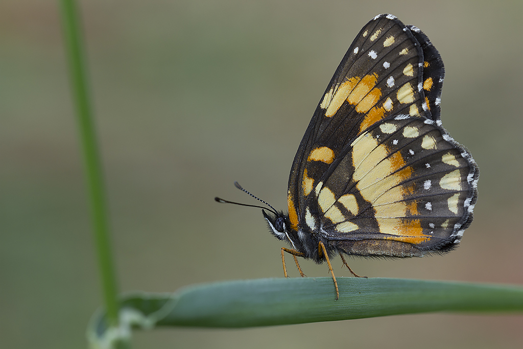 Local: Araçatuba/SP - Brasil Parque da Fazenda do Estado Bioma: Mata Atlântica Acessórios: Tripé + Trilho Foco Macro + Cabo Disparador Remoto